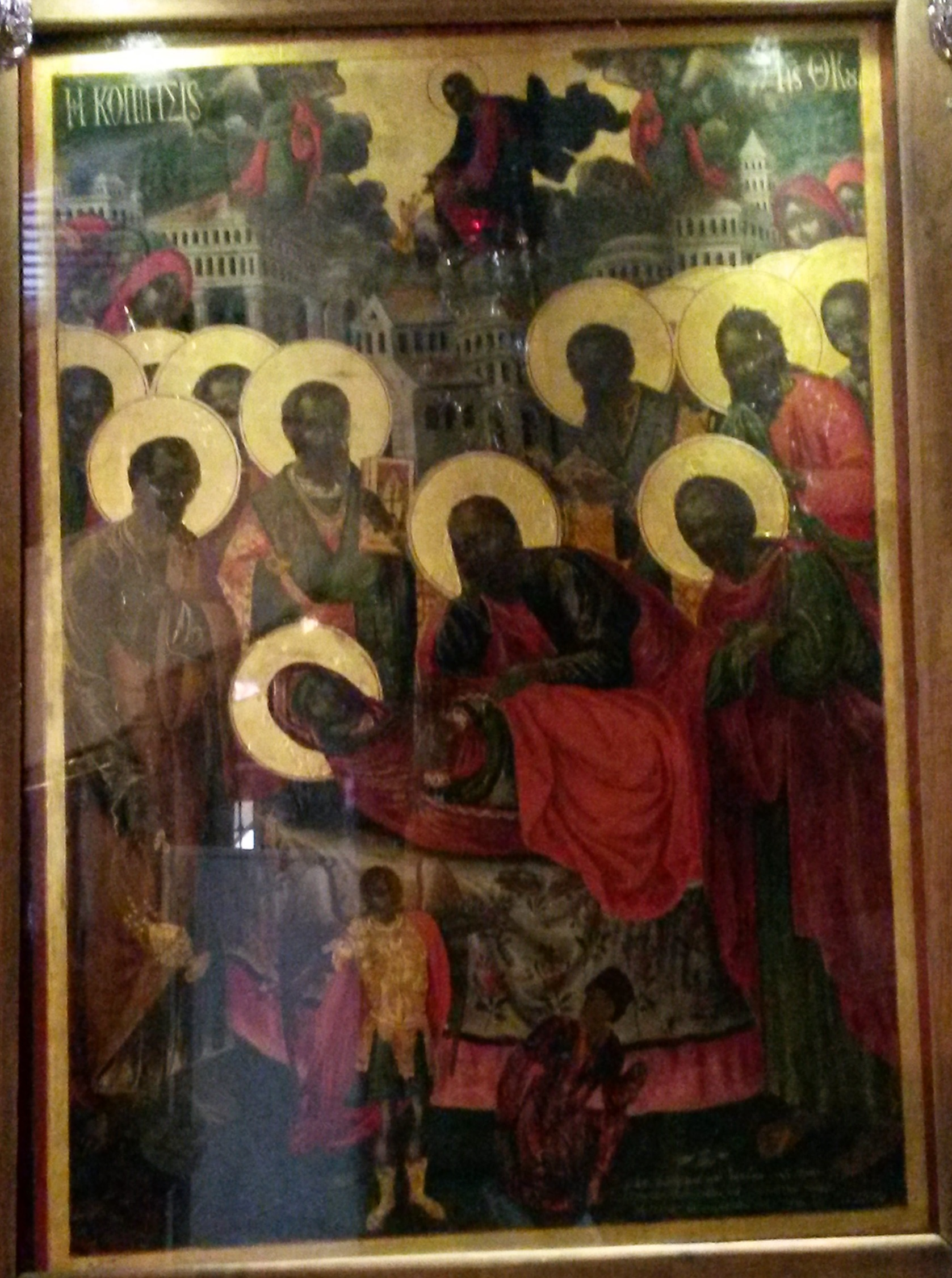 Η εικόνα της Κοιμήσεως της Θεοτόκου διά χειρός Γεώργιου εκ Σελήτζης .